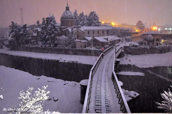 Scorcio centro storico di Cosenza con vista sul fiume Crati e Cupola di San Domenico durante nevicata gennaio 2016